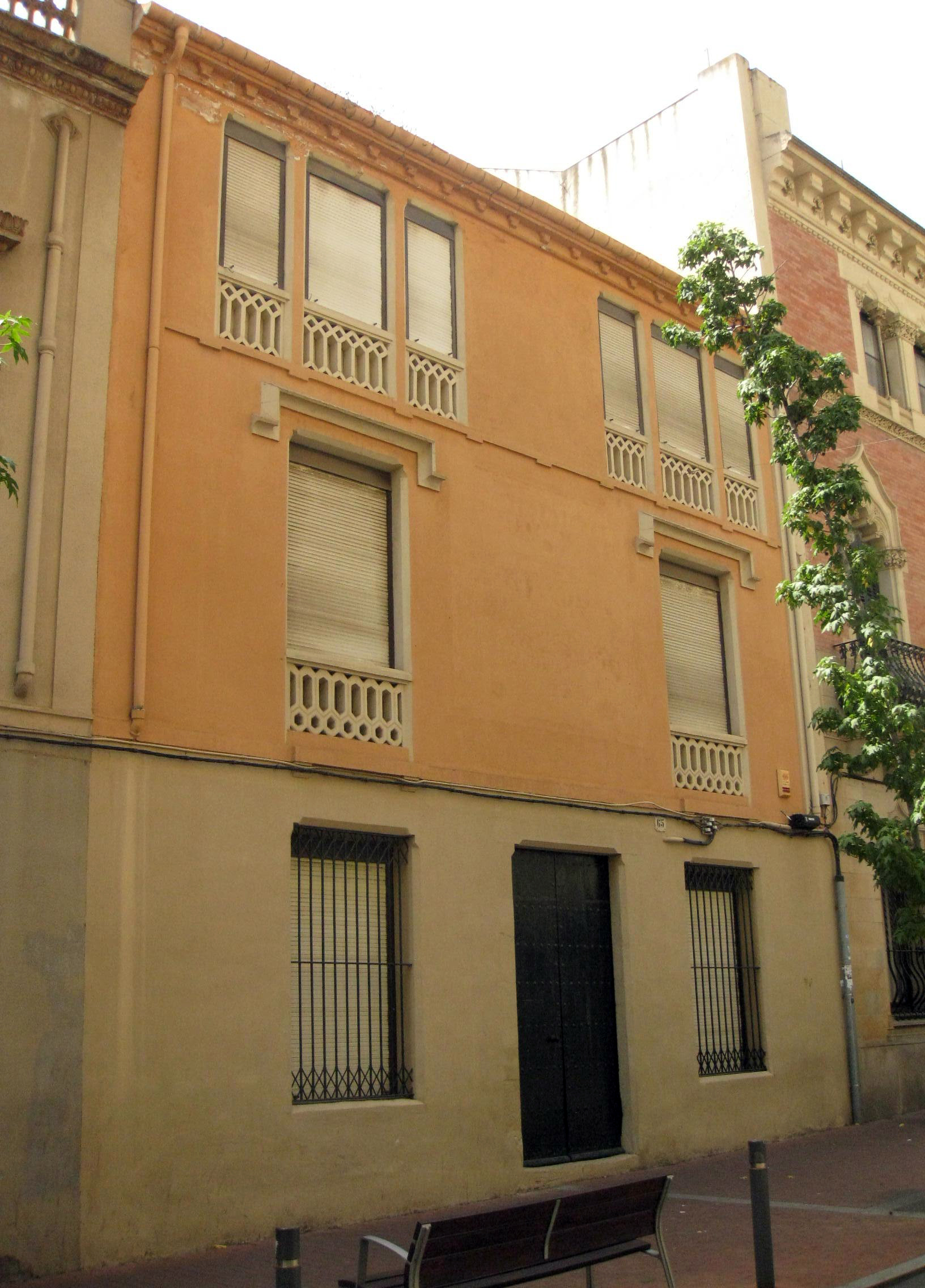 Casa Pere Comerma II, al carrer del Nord núm. 65 (Terrassa).